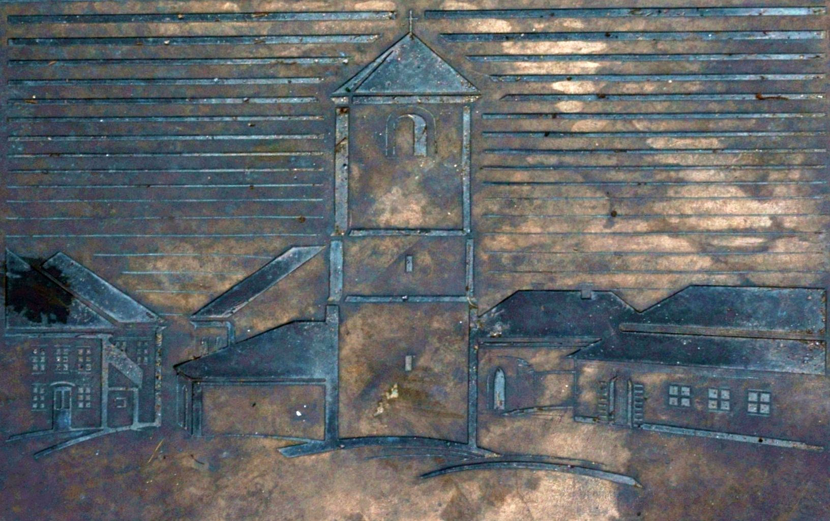 Zbořený gotický kostel sv. Jana Křtitele (sv. Barbory), jak je vyobrazen na pamětní desce v dlažbě na místě, kde stál.